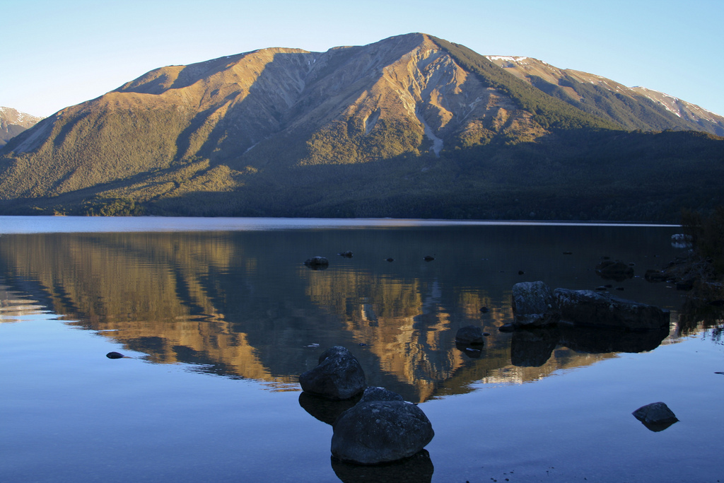 Mt Robert, Lake Rotoiti